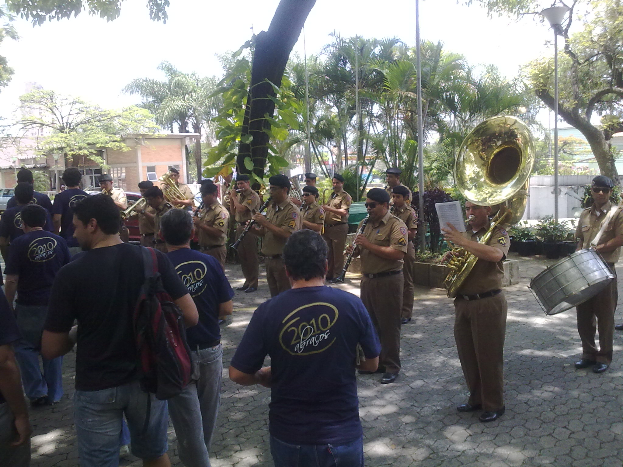 Banda militar a tocar no campus I do Centro Federal de Educação Tecnológica de Minas Gerais.